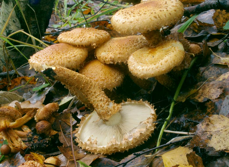 Pholiota squarrosa